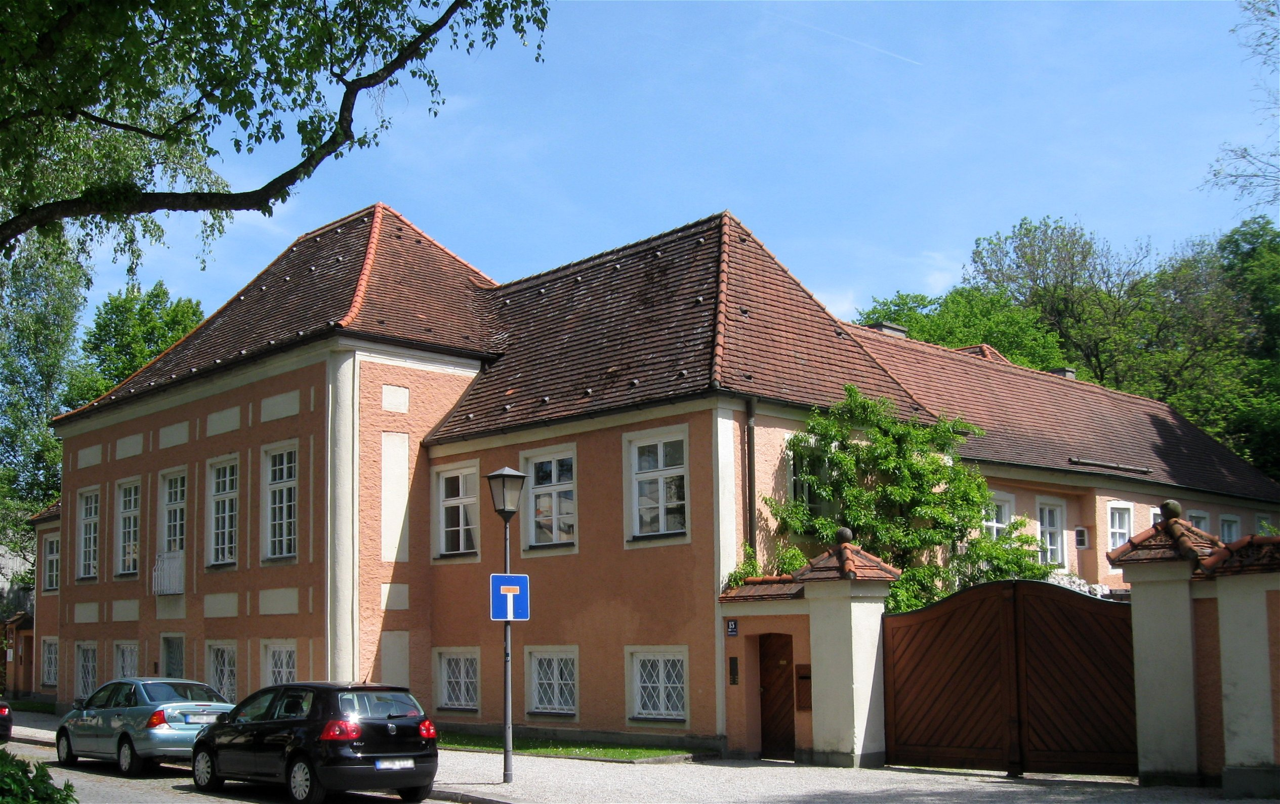 Birkenleiten 15; Schlösschen Birkenleiten, vierflügeliger Barockbau des 18. Jh.